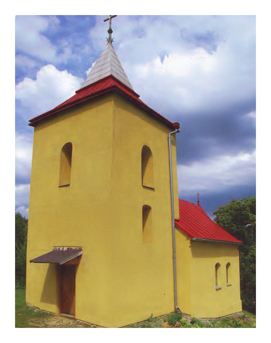 Kostol